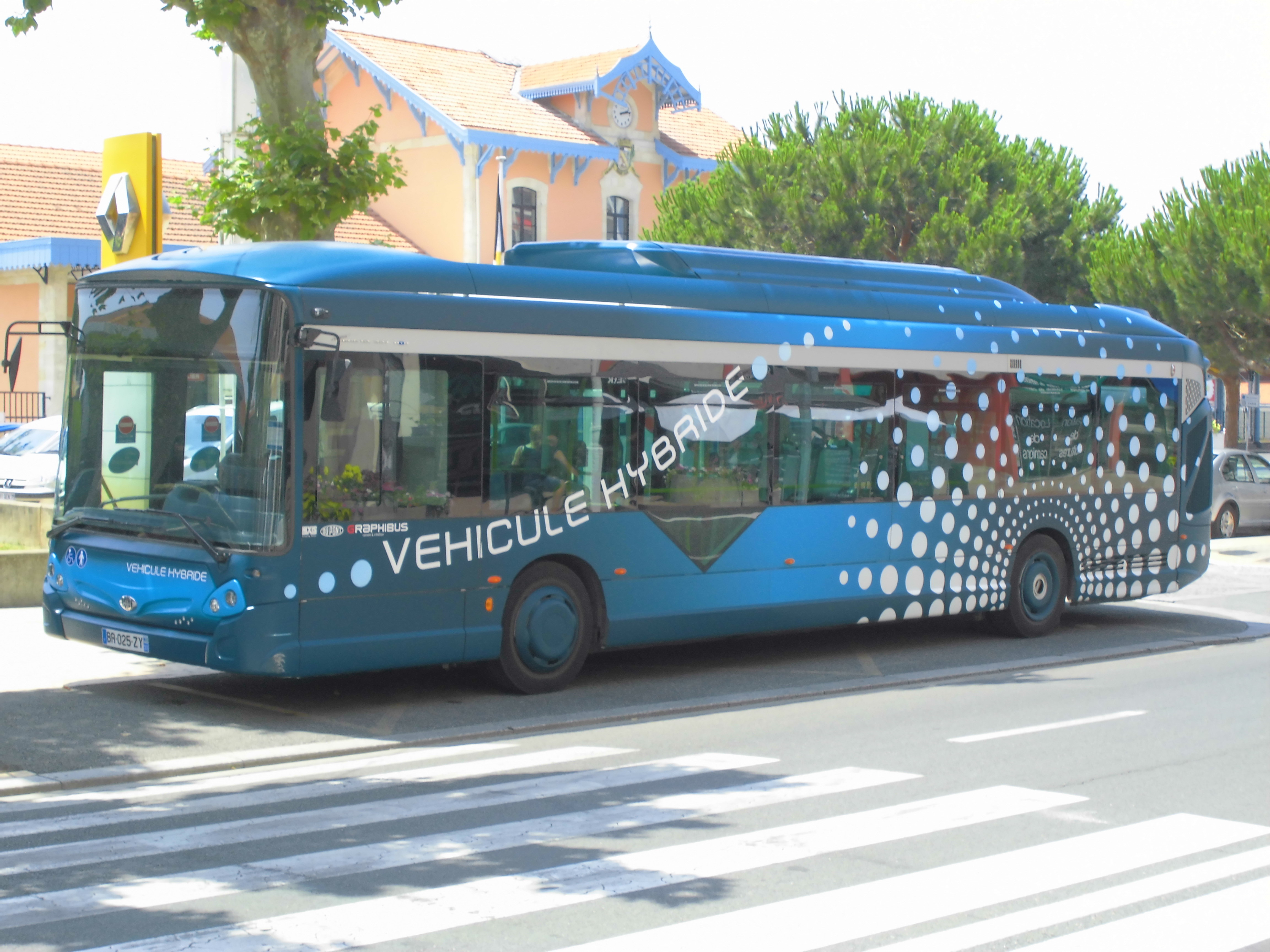 Ligne 3 sur le réseau Baïa à la gare d'Arcachon.